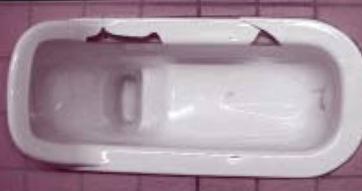 FV空気混入